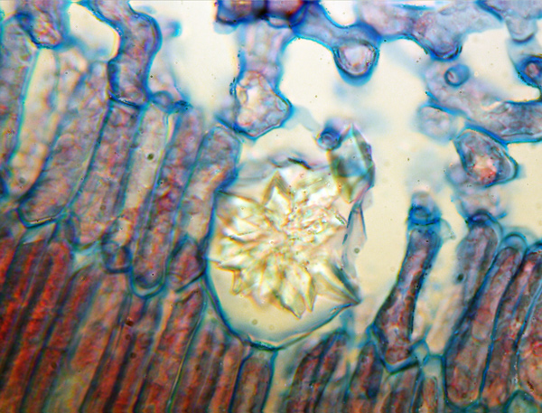 Kristallidioblast mit Raphidenbündel , Agavenblatt quer ,Durchlichtmikroskop ,400fach ,Astrablau und Safarin gefärbt.